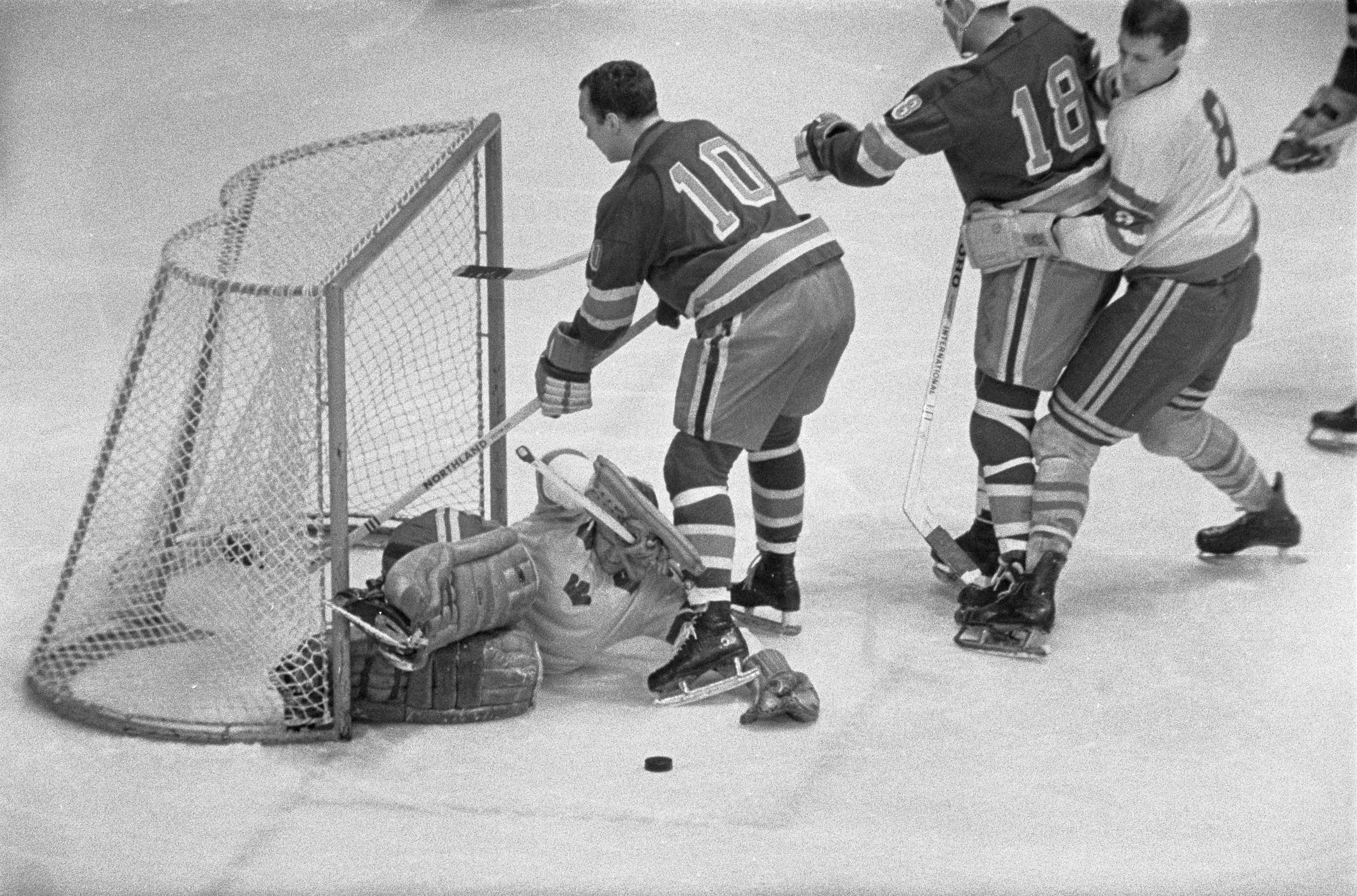 Collectie / Archief : Fotocollectie Anefo Reportage / Serie : [ onbekend ] Beschrijving : Olympische spelen ijshockey Zweden tegen Amerika Datum : 7 februari 1968 Locatie : Amerika, Zweden Trefwoorden : IJSHOCKEY Fotograaf : Kroon, Ron / Anefo Auteursrechthebbende : Nationaal Archief Materiaalsoort : Negatief (zwart/wit) Nummer archiefinventaris : bekijk toegang 2.24.01.05 Bestanddeelnummer : 921-0653